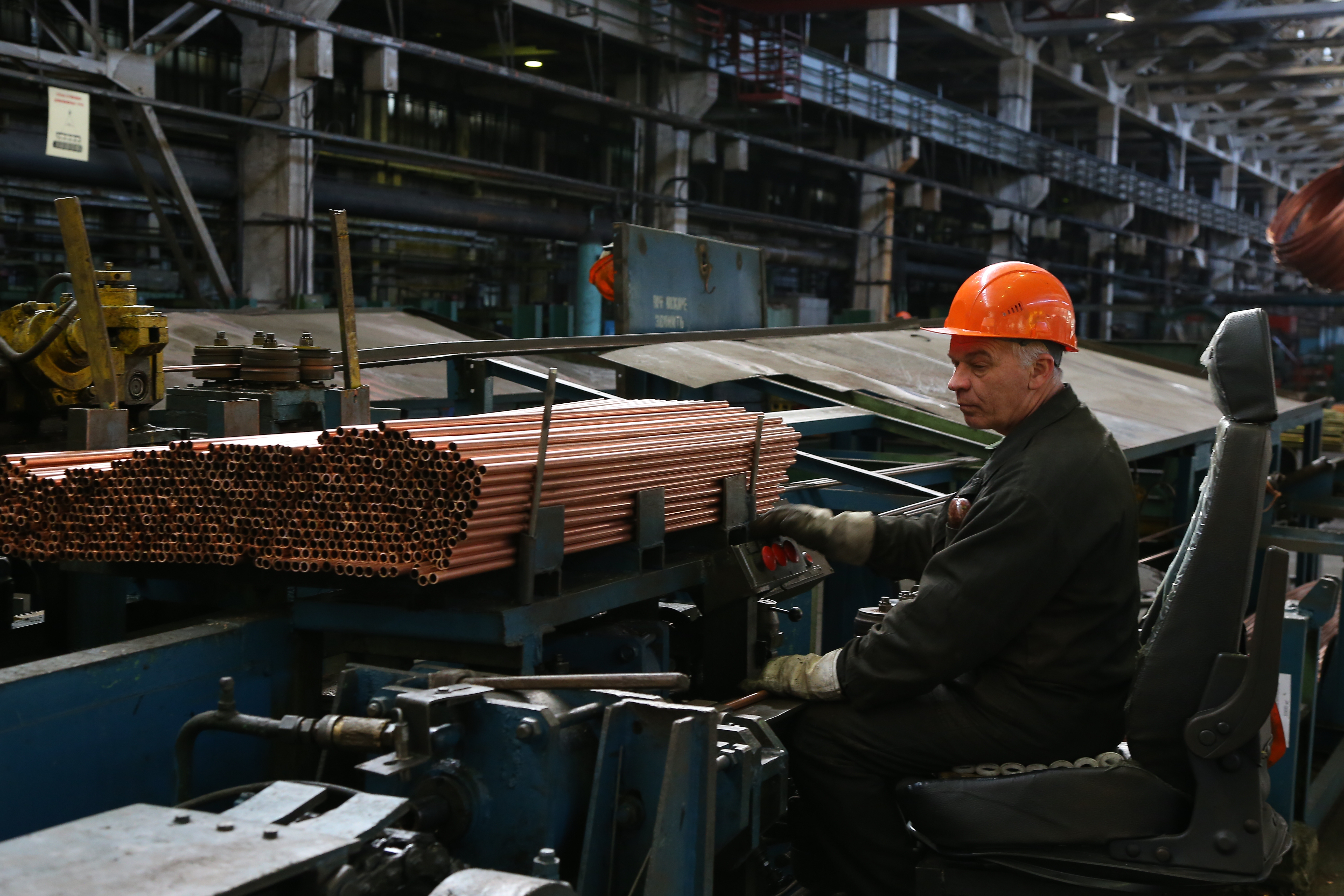 Производственный процесс прессово-волочильного цеха РЗОЦМ